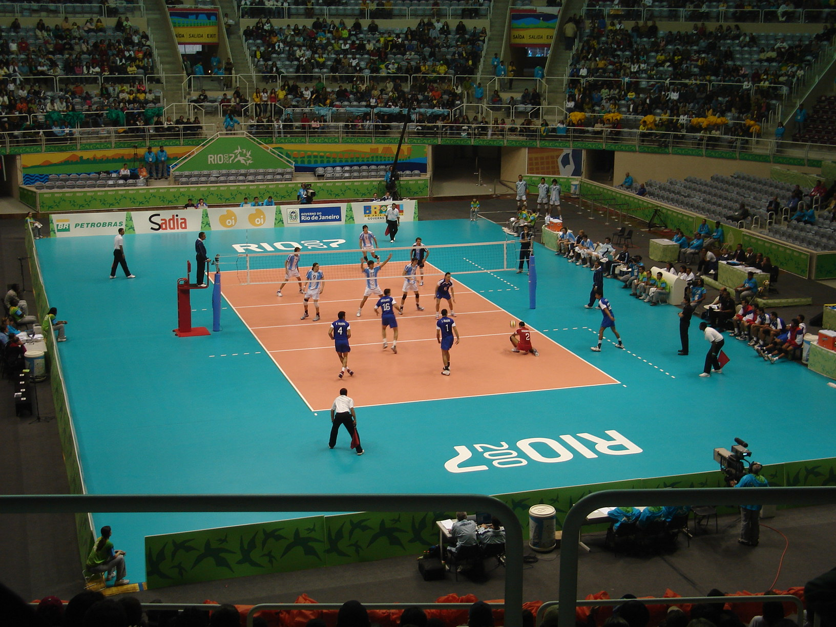 Jogo entre Argentina e Puerto Rico, 2007, pelo PAN do Rio.